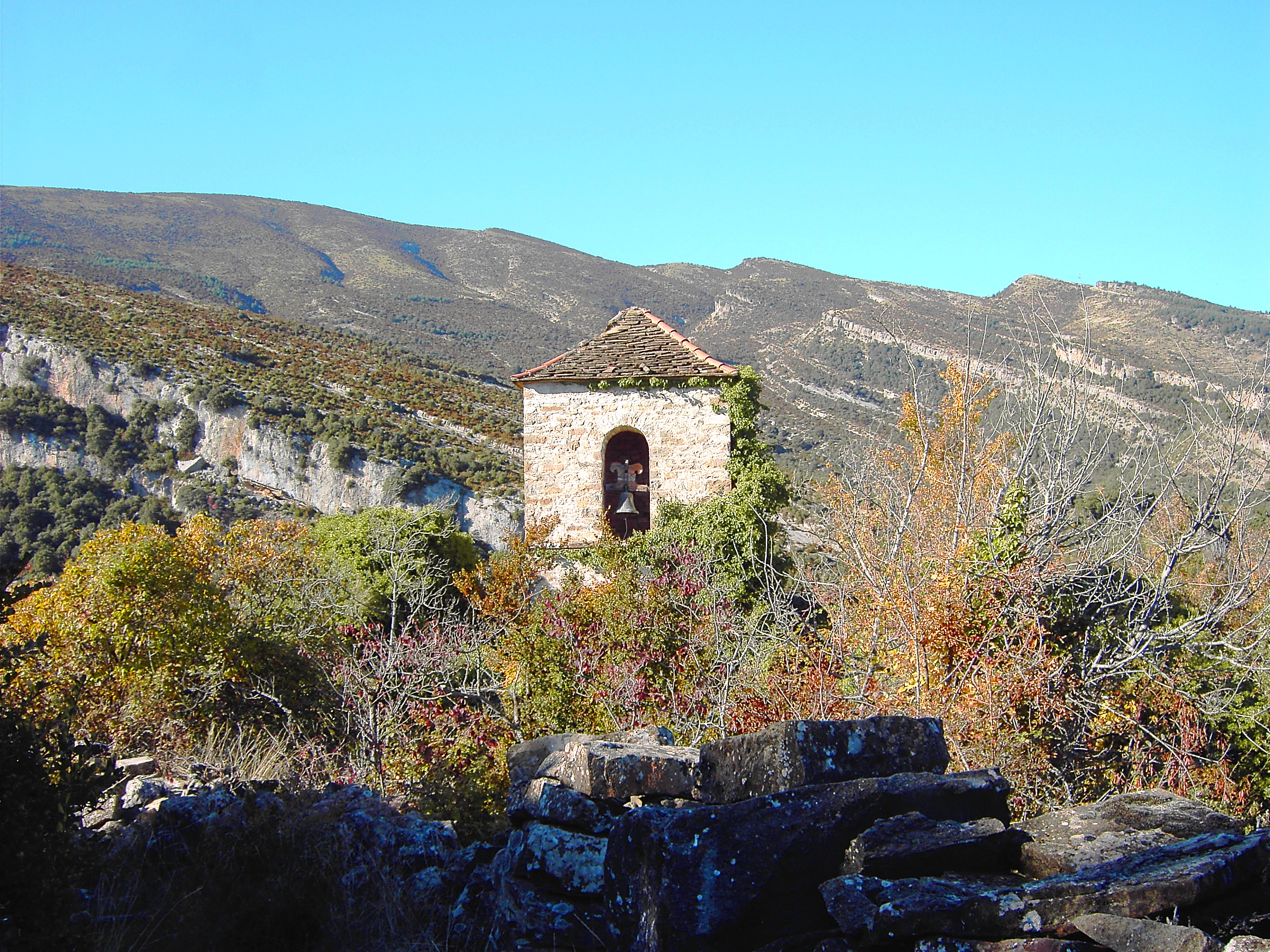 El campanario de Ascaso y detrás de él, la ladera del Patro de l'Estallo (O Nabaín)